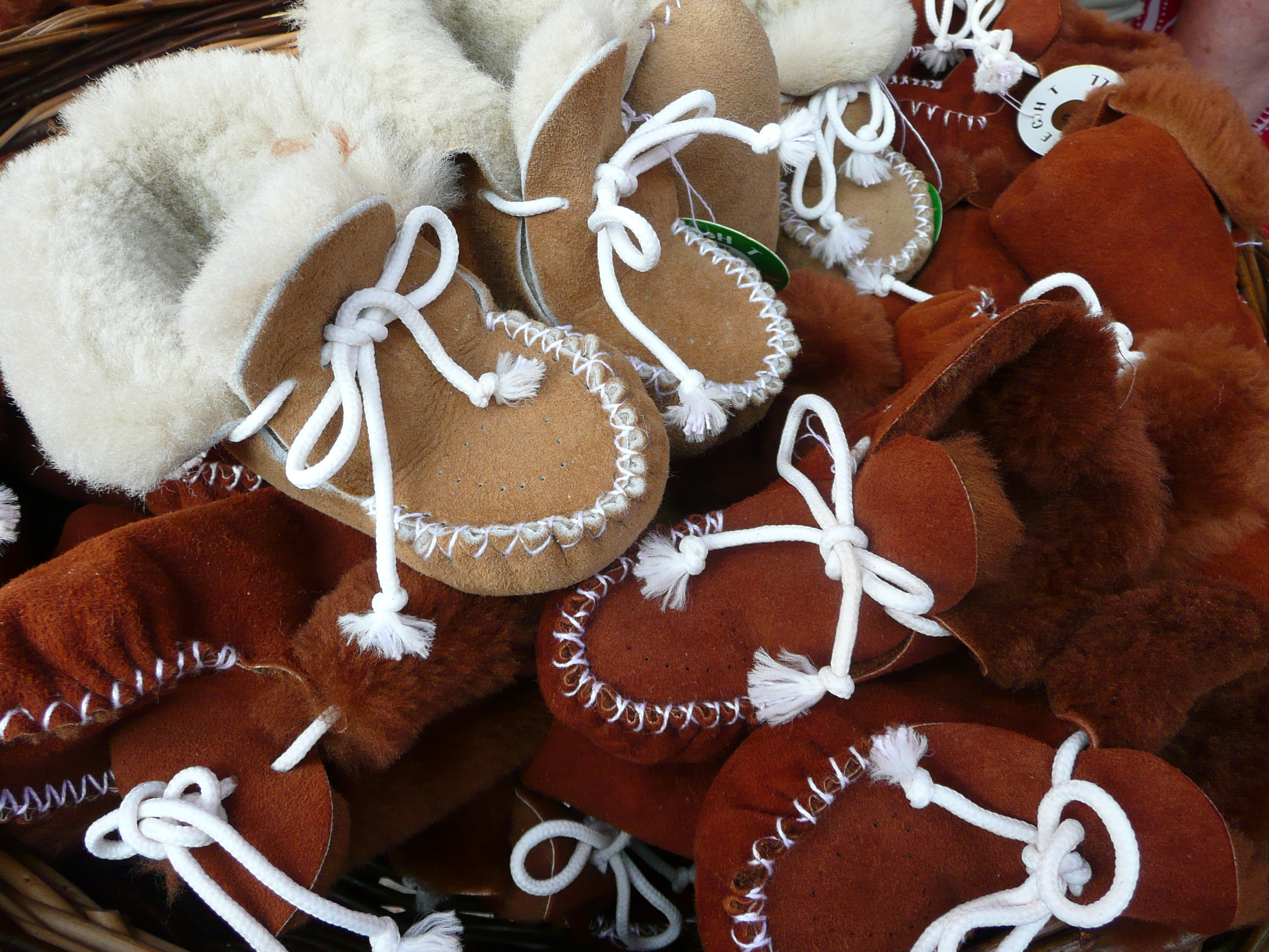 Lederschuhe für Säuglinge und Kleinkinder, gefüttert mit Lammfell